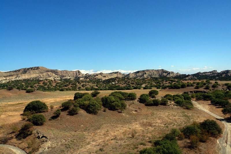 Vashlovani State Reserve